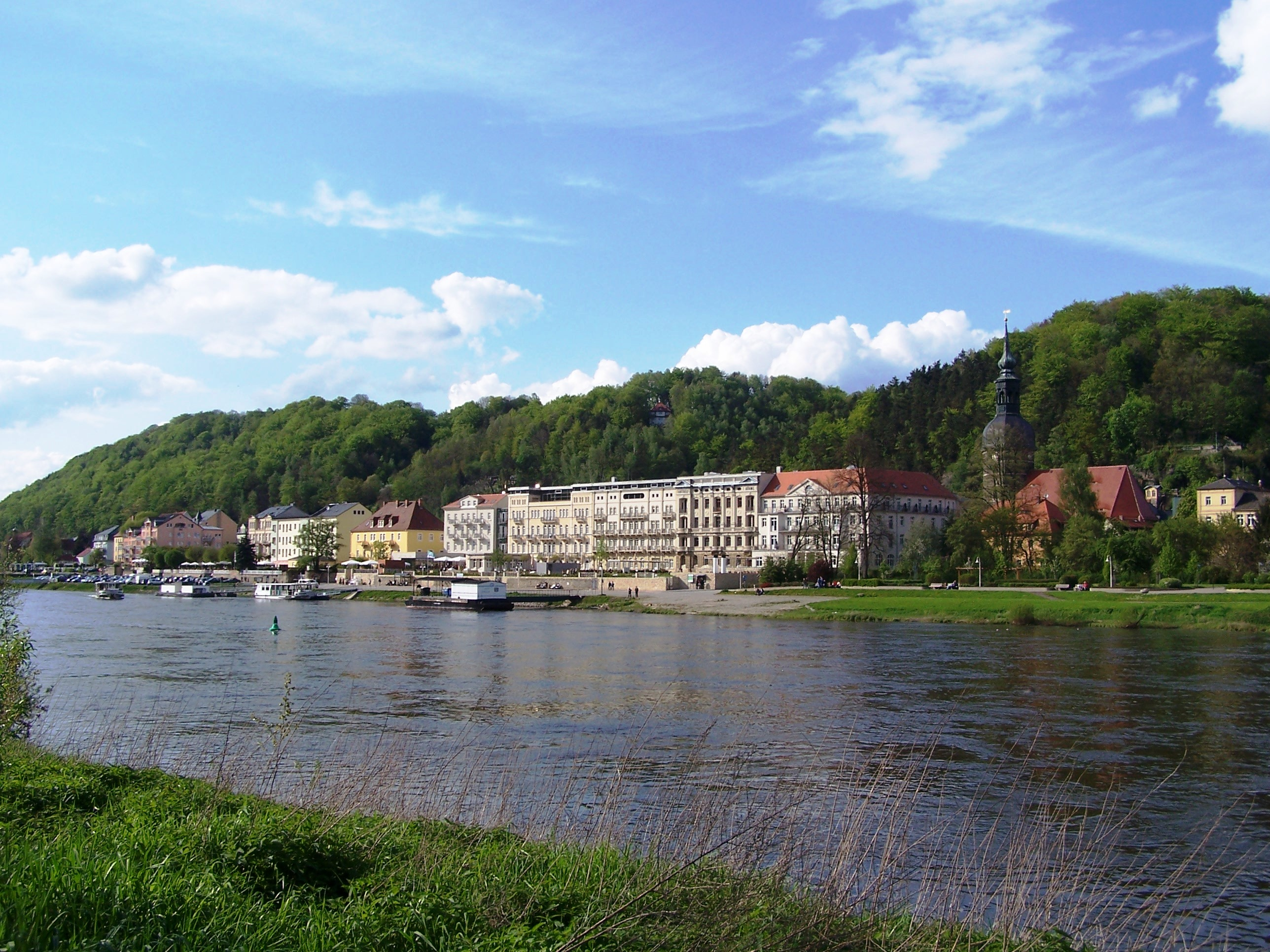 Bad Schandau, Sächsische Schweiz. Rechts die Johanniskirche